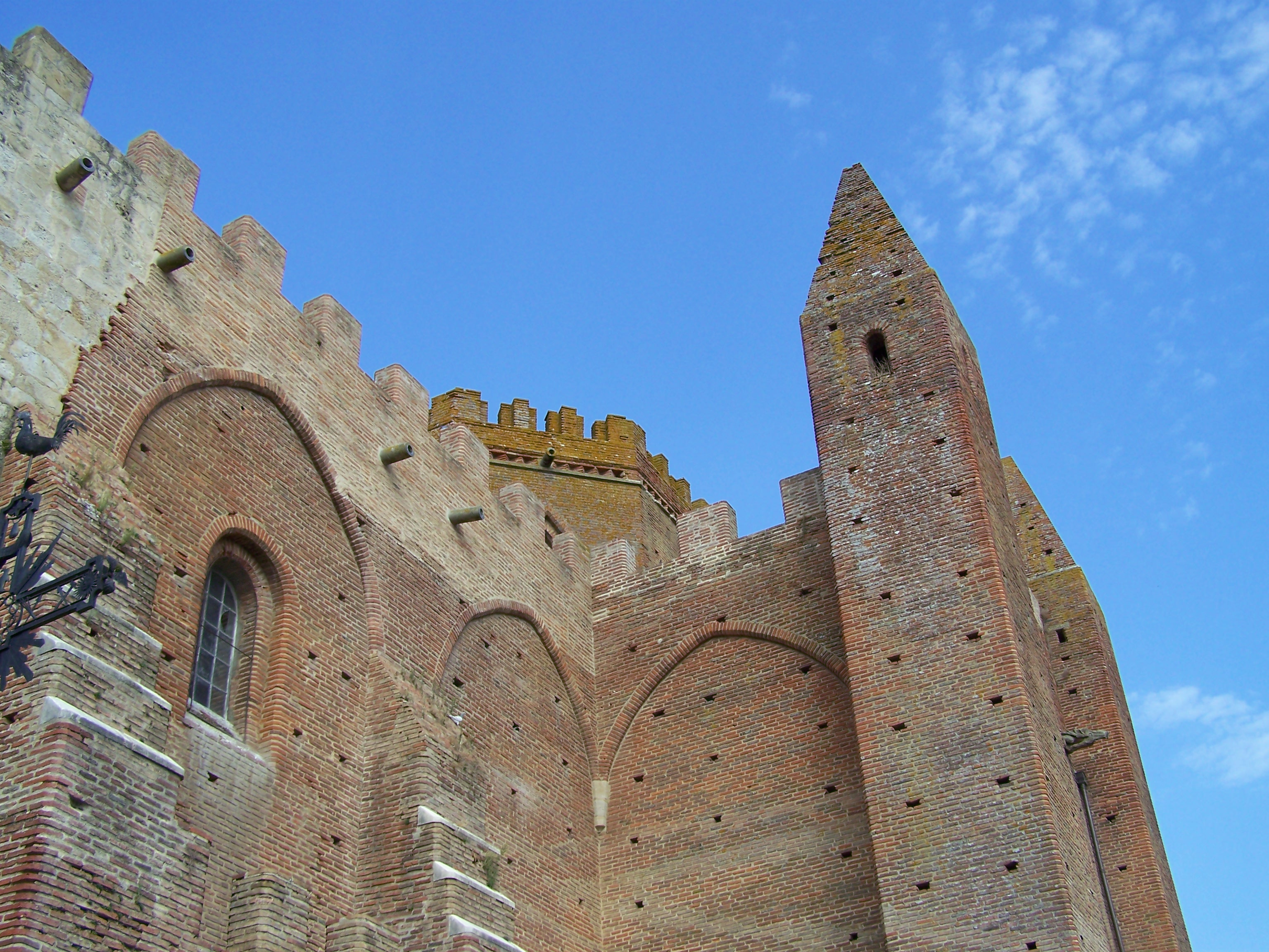 Église de Simorre, Gers, France